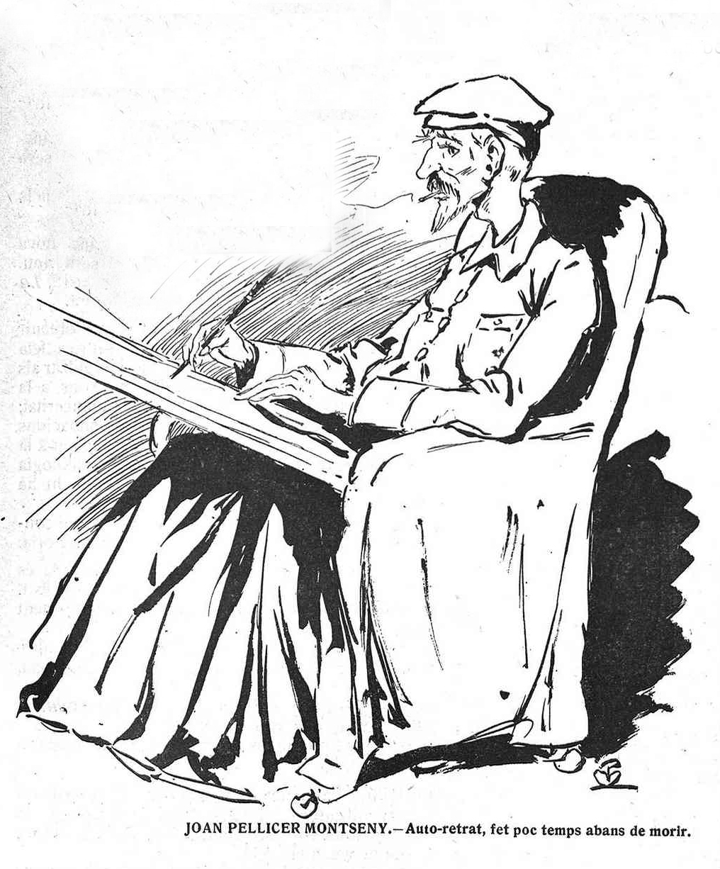 Auto-retrat, fet poc temps abans de morir.